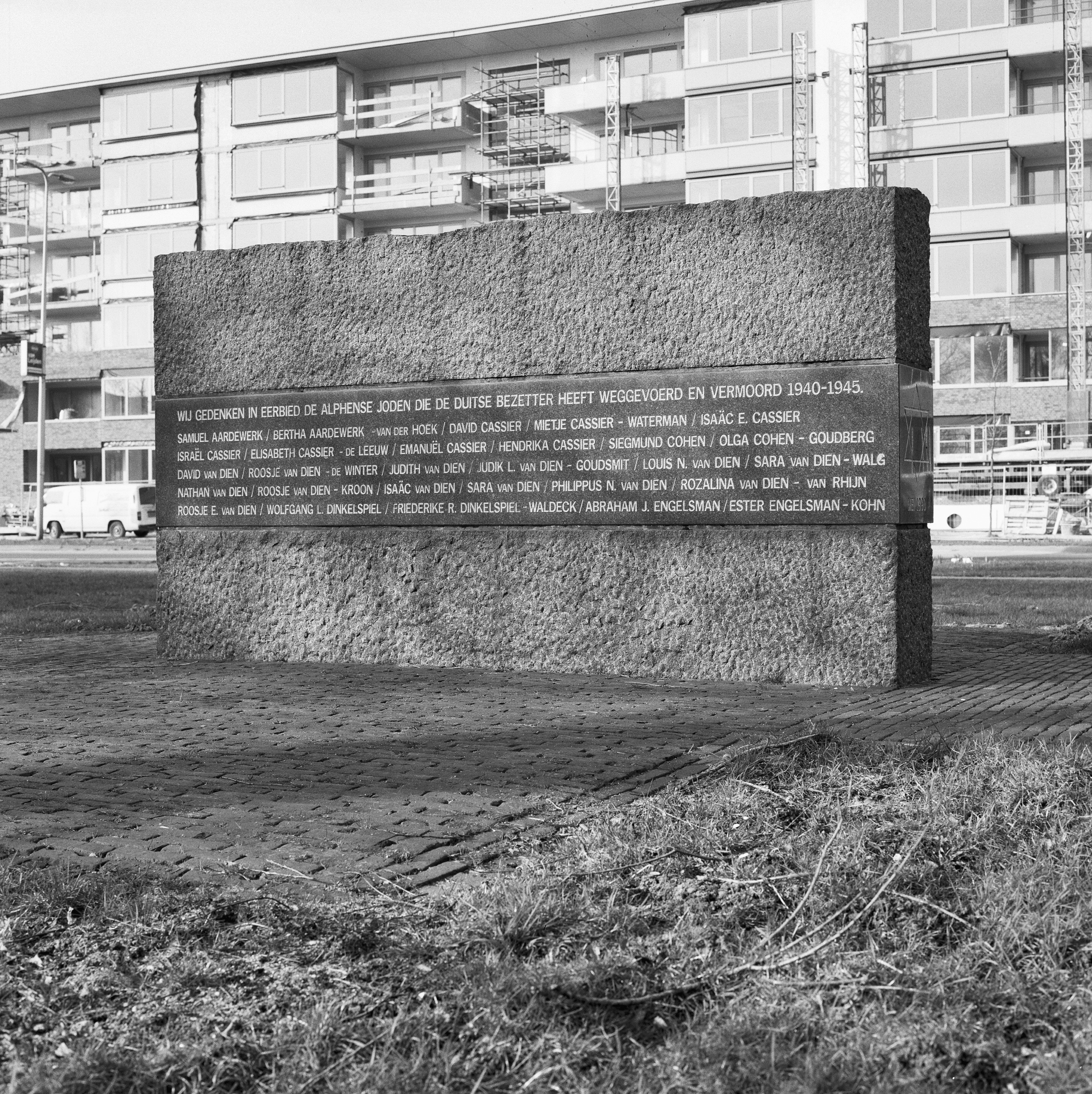 Joods monument: Monument voor omgekomen Joodse burgers van Alphen aan den Rijn, zuidzijde (opmerking: Gefotografeerd voor Het Monumentale Hart van Holland)